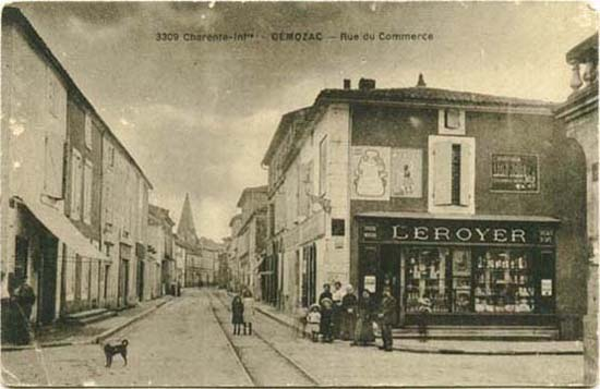 Une vue de Gémozac durant les années 20.